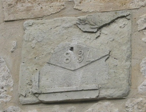 Plaque de maison Lieu : Soumenac Lot & Garonne Date de prise de vue novembre 2006 Auteur : Jacques David